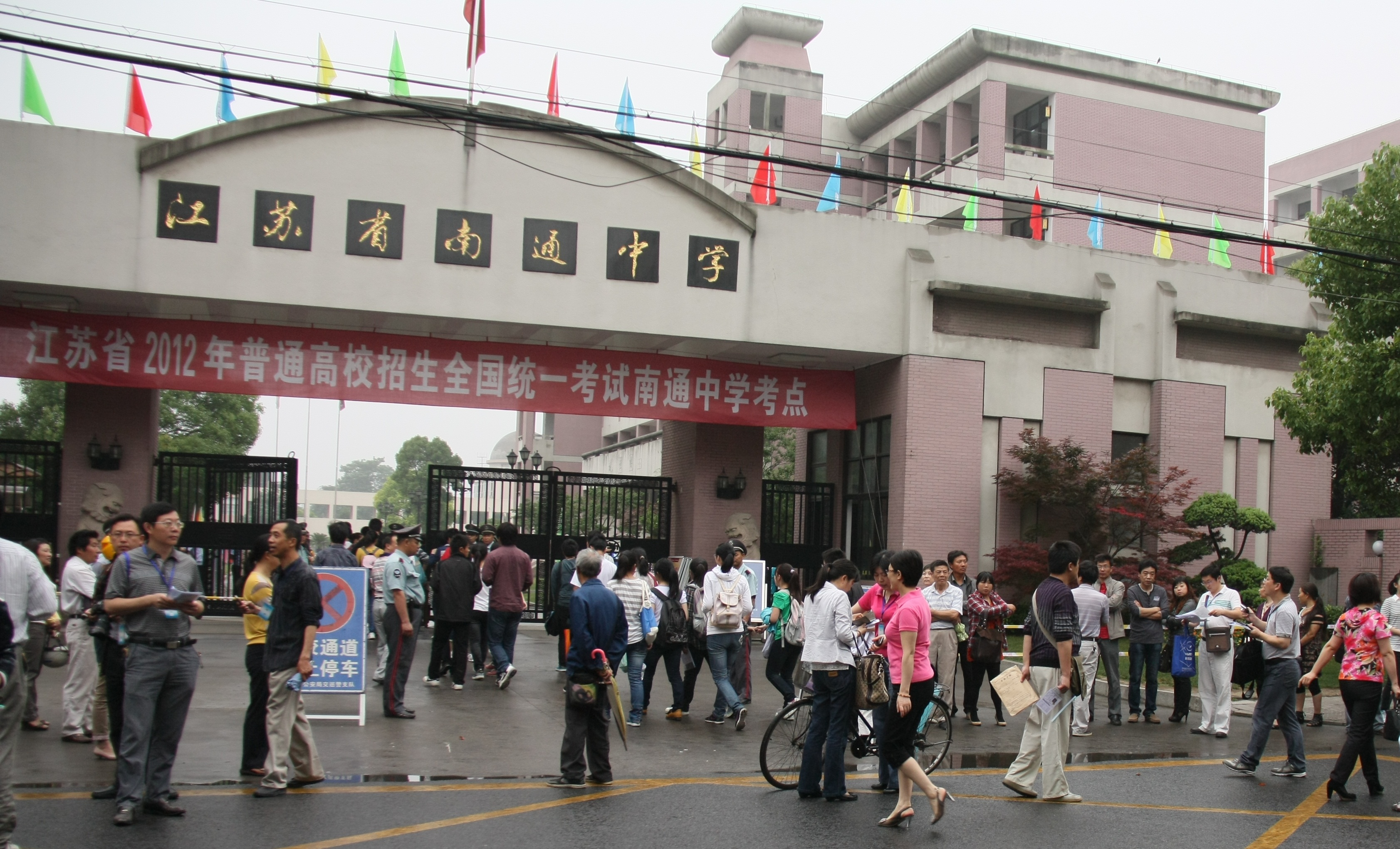 中文（中国大陆）: 2012年普通高等学校招生全国统一考试江苏省南通中学考点。